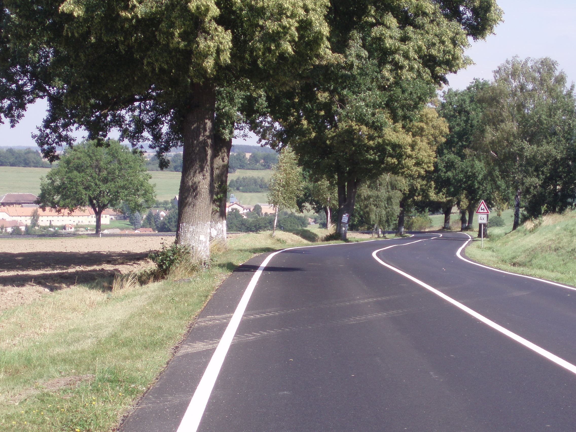 II/112 Rynárec - Zajíčkov (serpentýny)